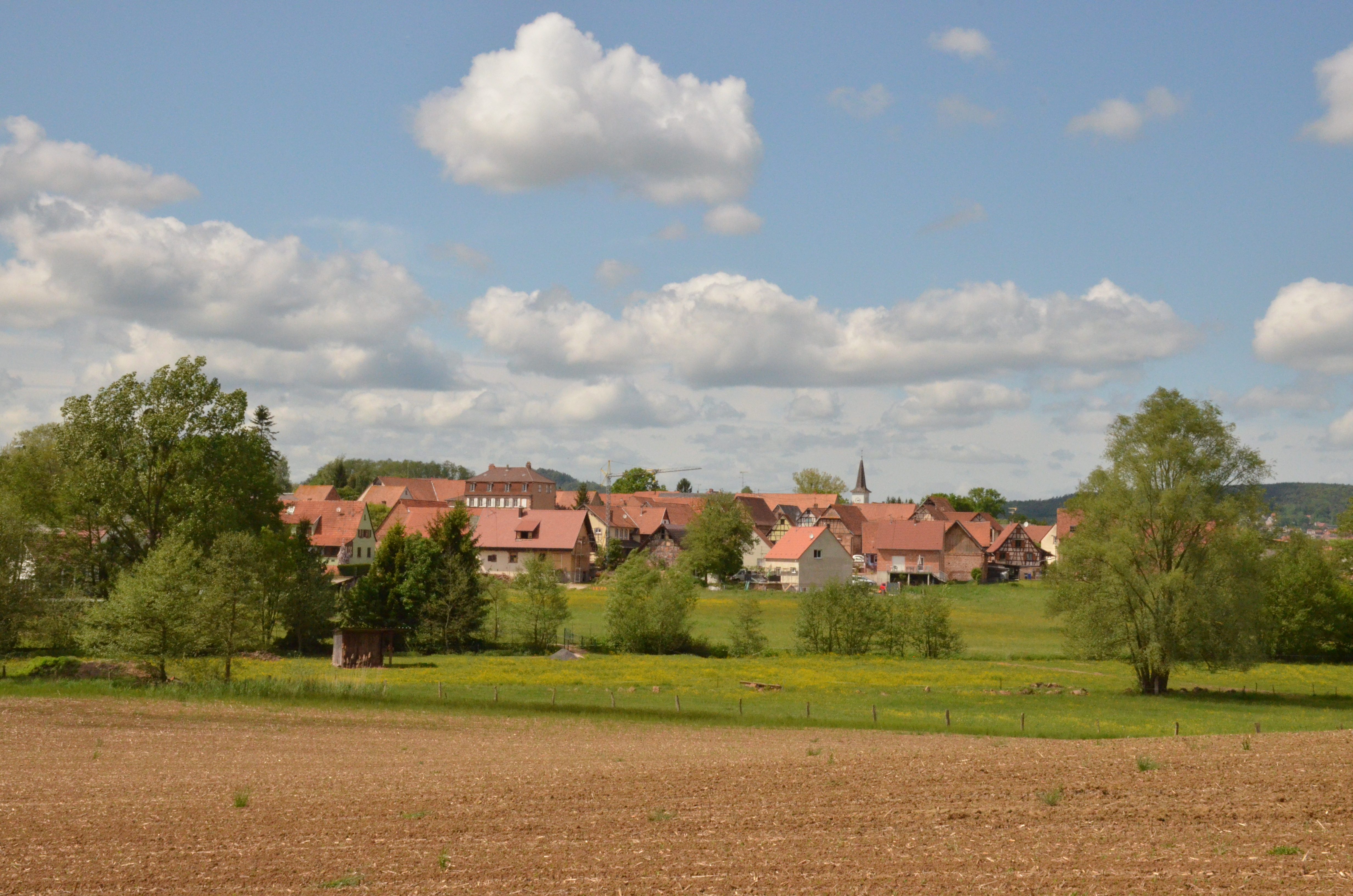 Le village de Mulhausen en Alsace vu depuis les champs